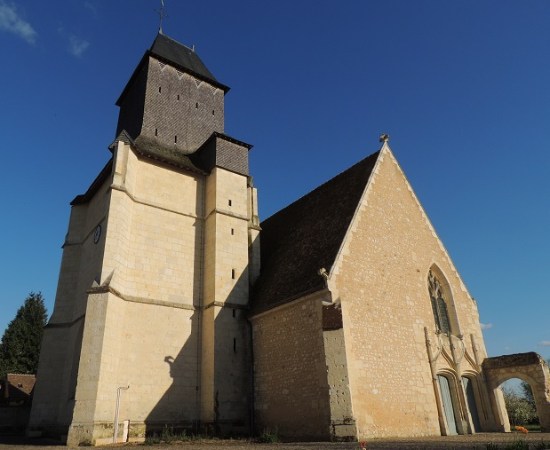 Église Saint-Pierre d'Avezé, avec énorme clocher-tour carré jouxtant la grande nef côté Nord, surmonté non d'une flèche mais d'un toit à 4 pans traditionnel. Une voussure prolonge la nef pour l'accès côté Sud Ouest à côté d'un double portail à accolades et pinacles sur la façade occidentale